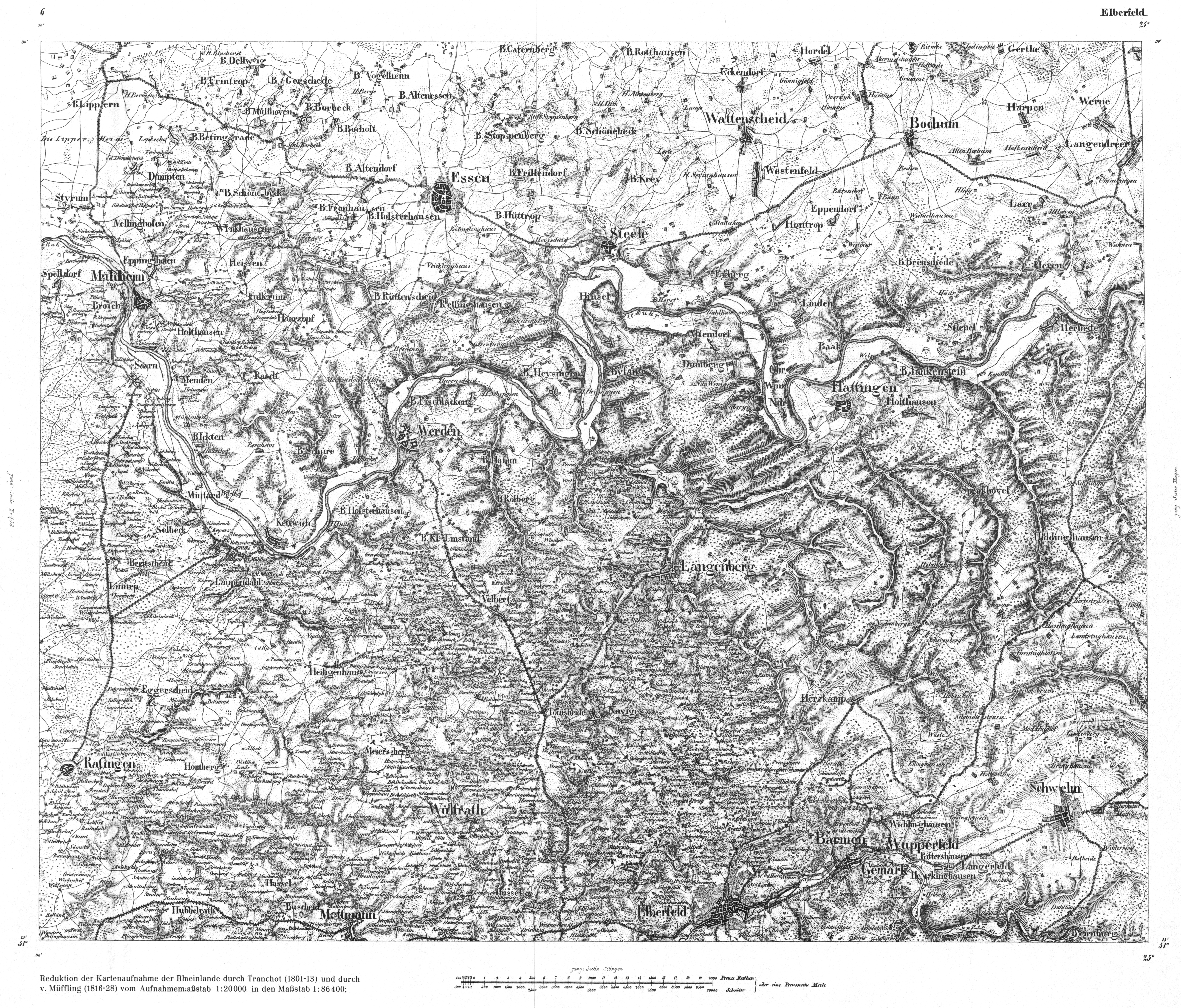 Map of a part of North Rhine-Westphalia, early 19th century, showing Ratingen, Wuppertal, Mülheim, Essen and Bochum in Germany. Preußische Generalstabskarte 1:86 400, halbe Gradeinteilung (1816–1847) Reduktion der Kartenaufnahme der Rheinlande durch Tranchot (1801–13) und durch von Müffling vom Aufnahmemaßstab 1:20 000 in den Maßstab 1:86 400; Ursprüngliche Blattbezeichnung: C 10-6.